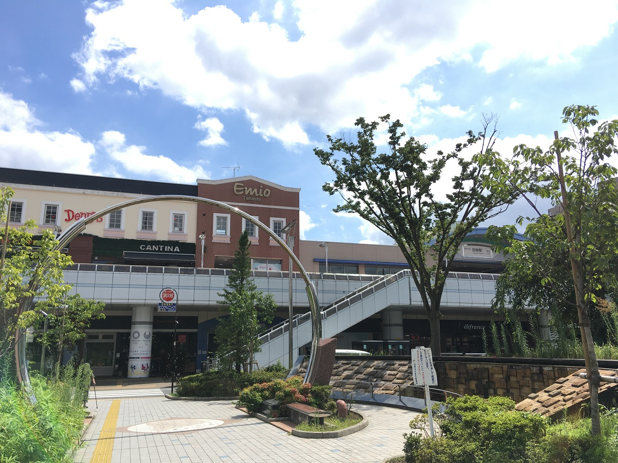 田無駅北口広場